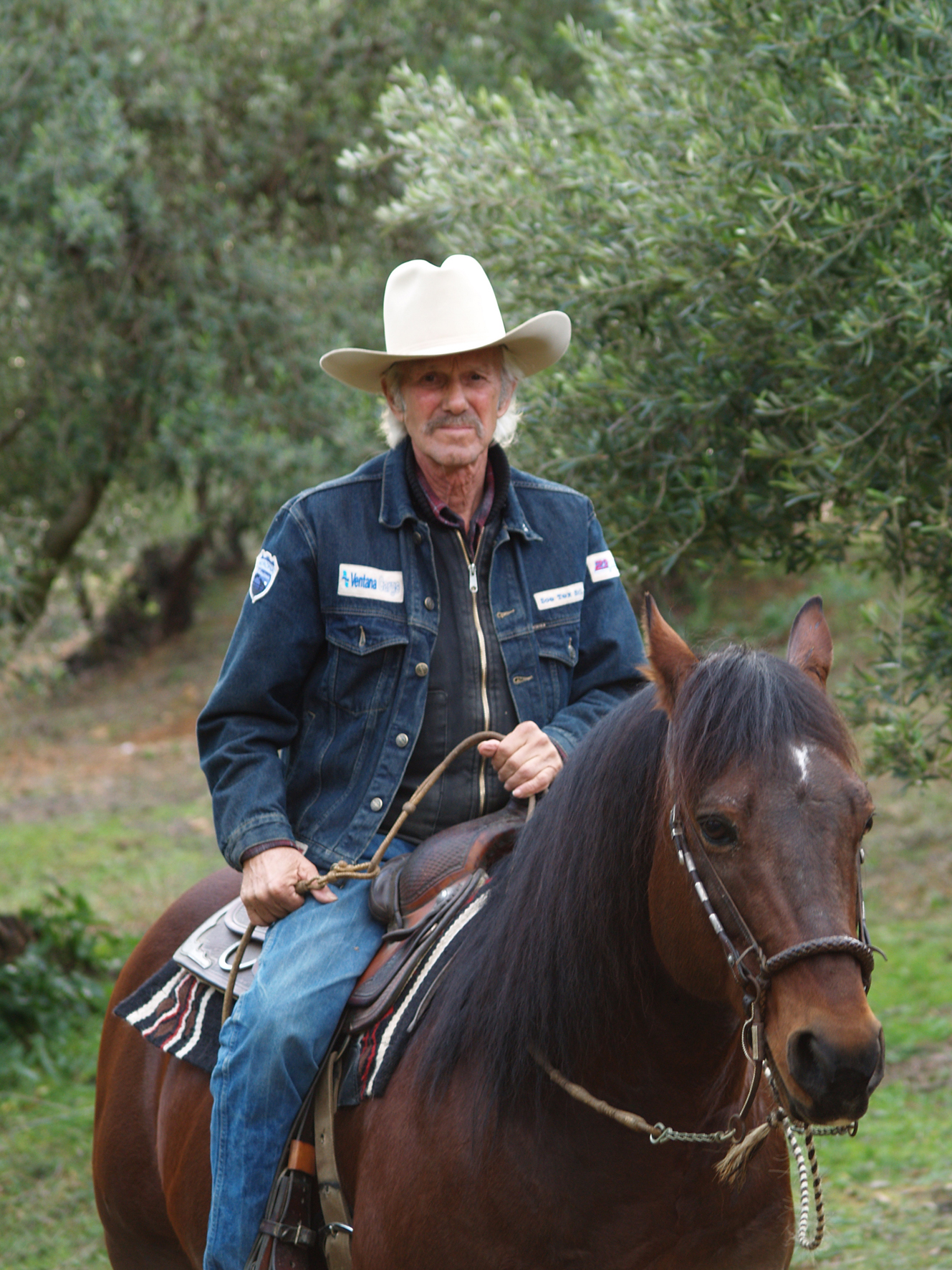 Jean-Claude Dysli, Der Nestor des Westernreitens in Europa, DQHA Gründungsvorstand und Hall of Fame